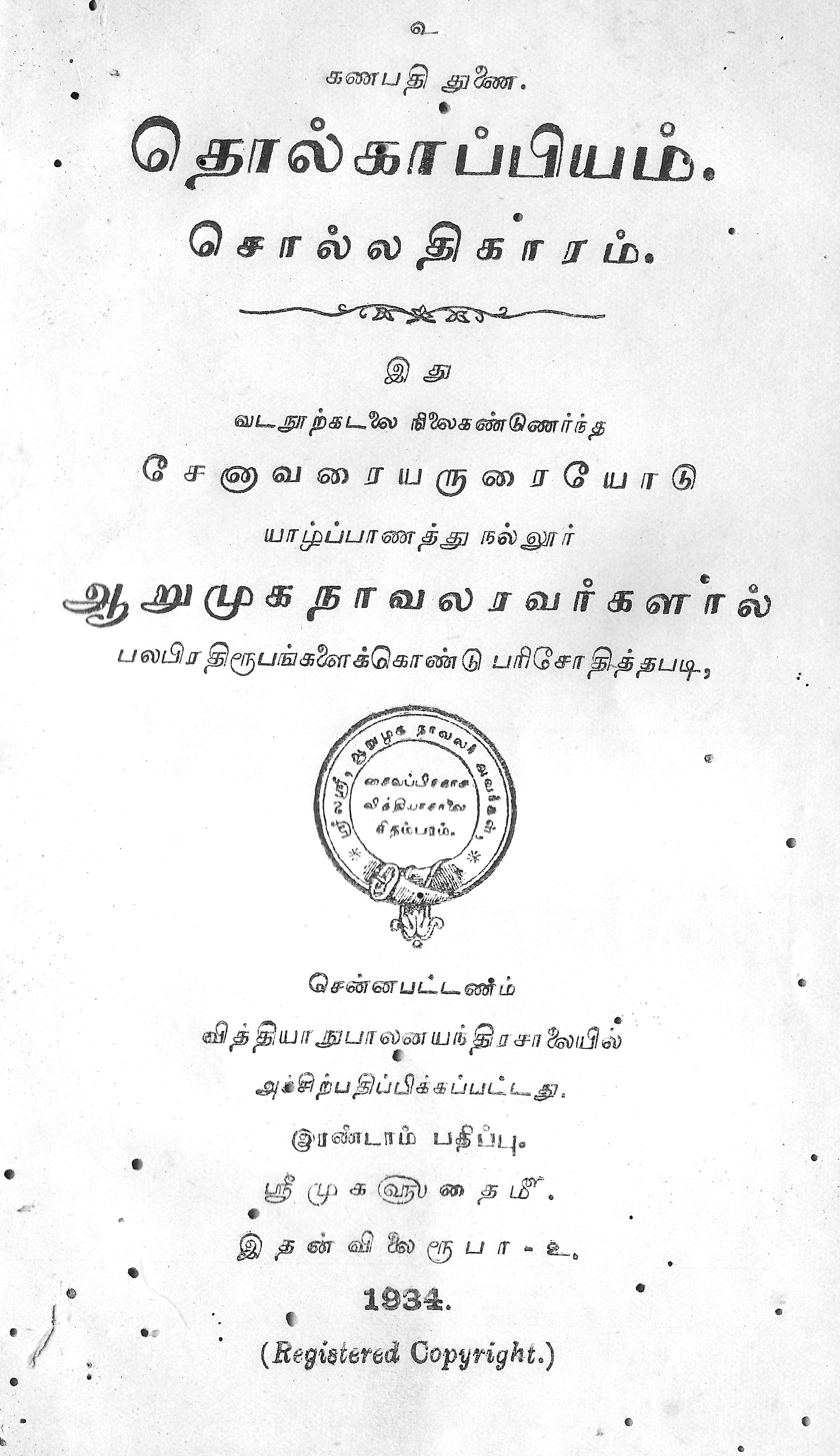 நூல் முகப்பு - தொல்காப்பியம் சொல்லதிகாரம் சேனாவரையர் உரை